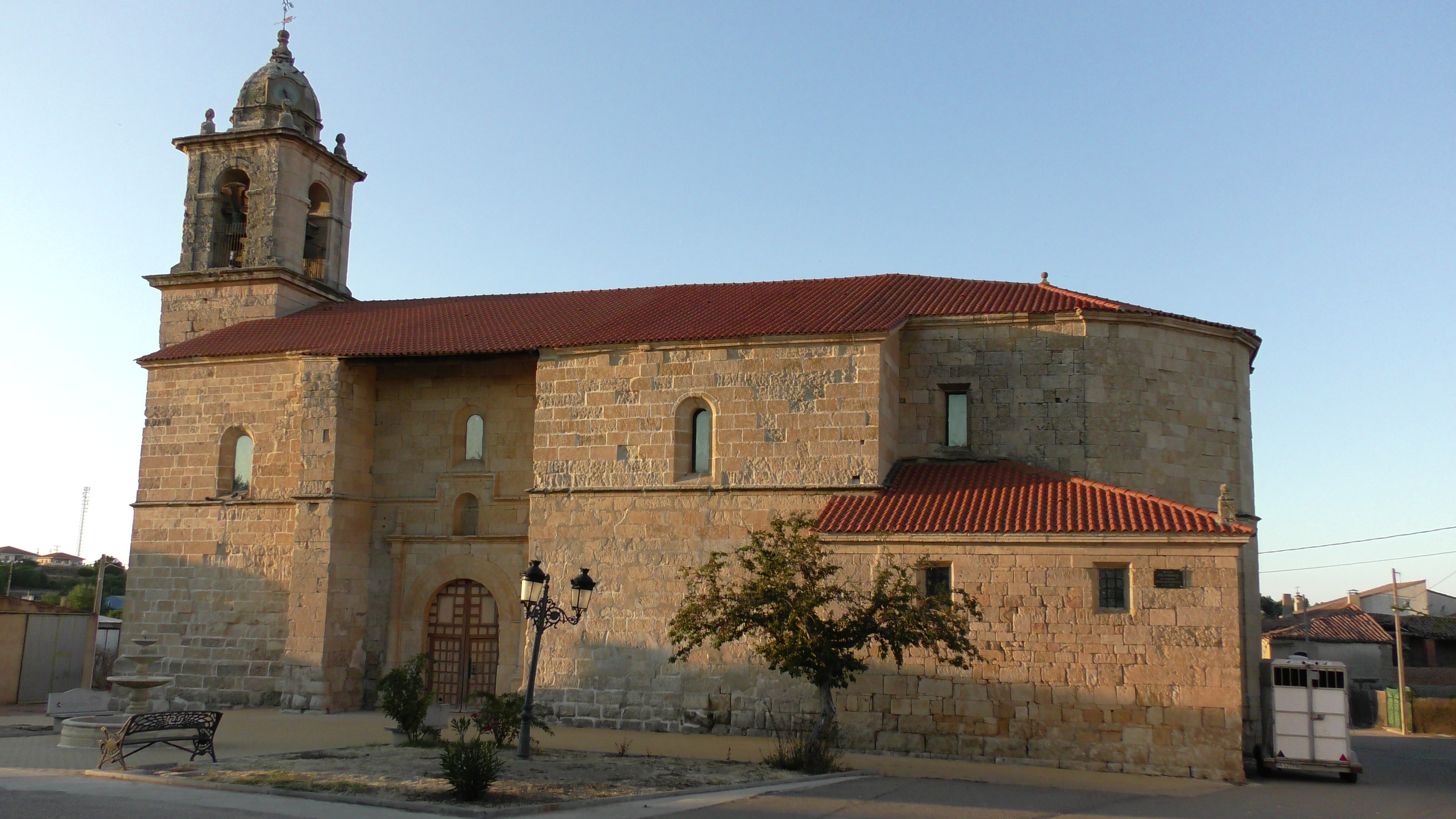 Argujillo